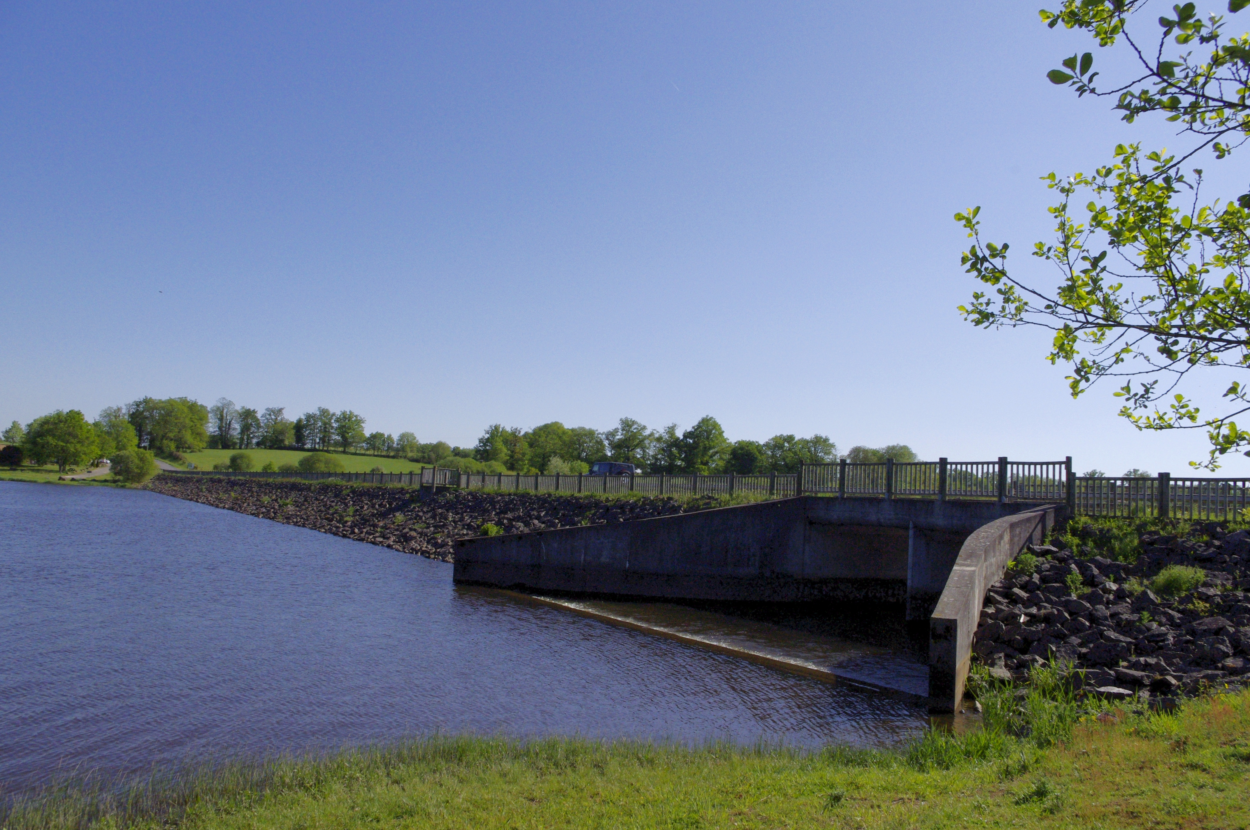 Lac de Lavaud près de la route D 160 en Charente.